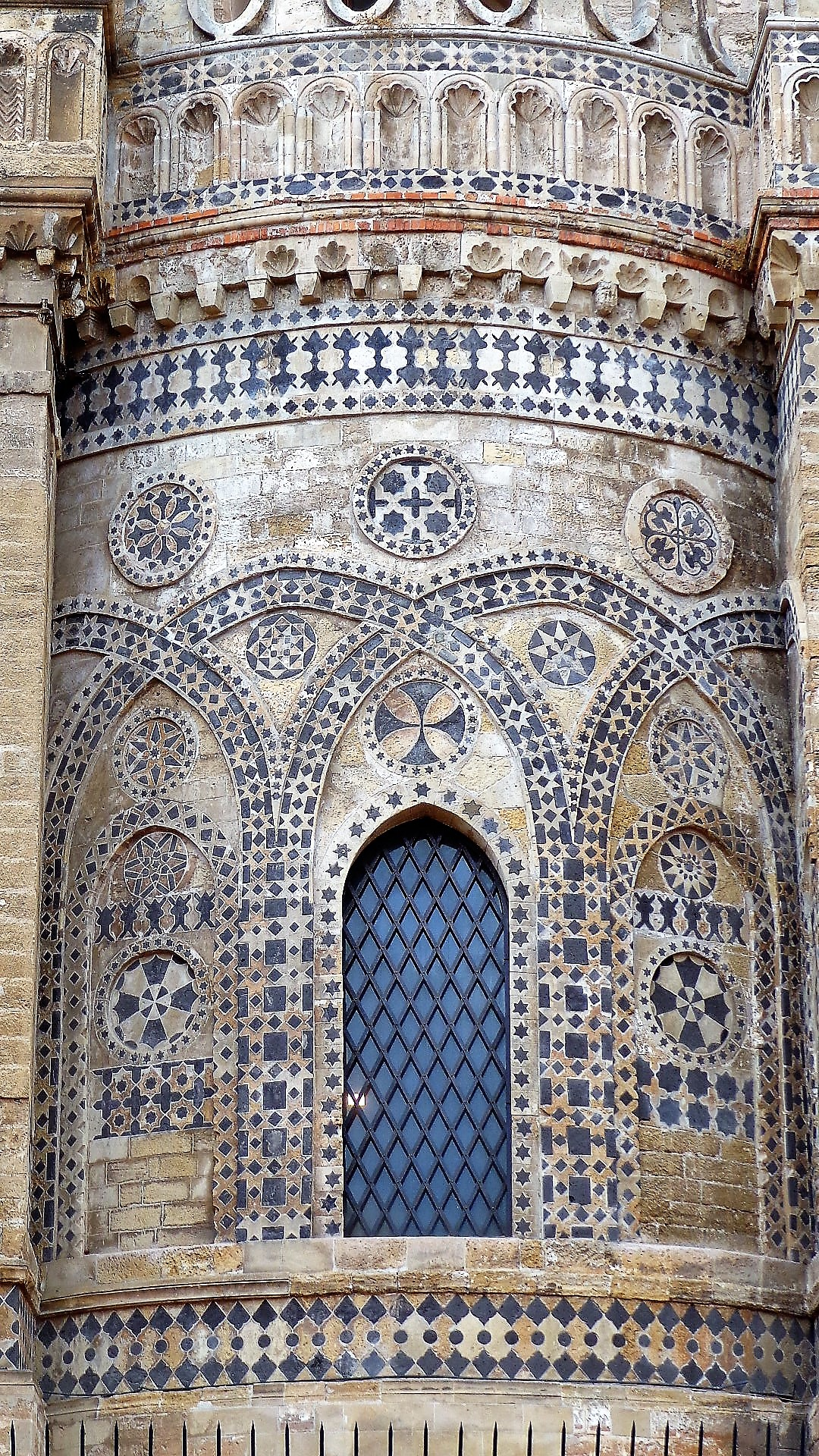 Abside destra Piano della Cattedrale